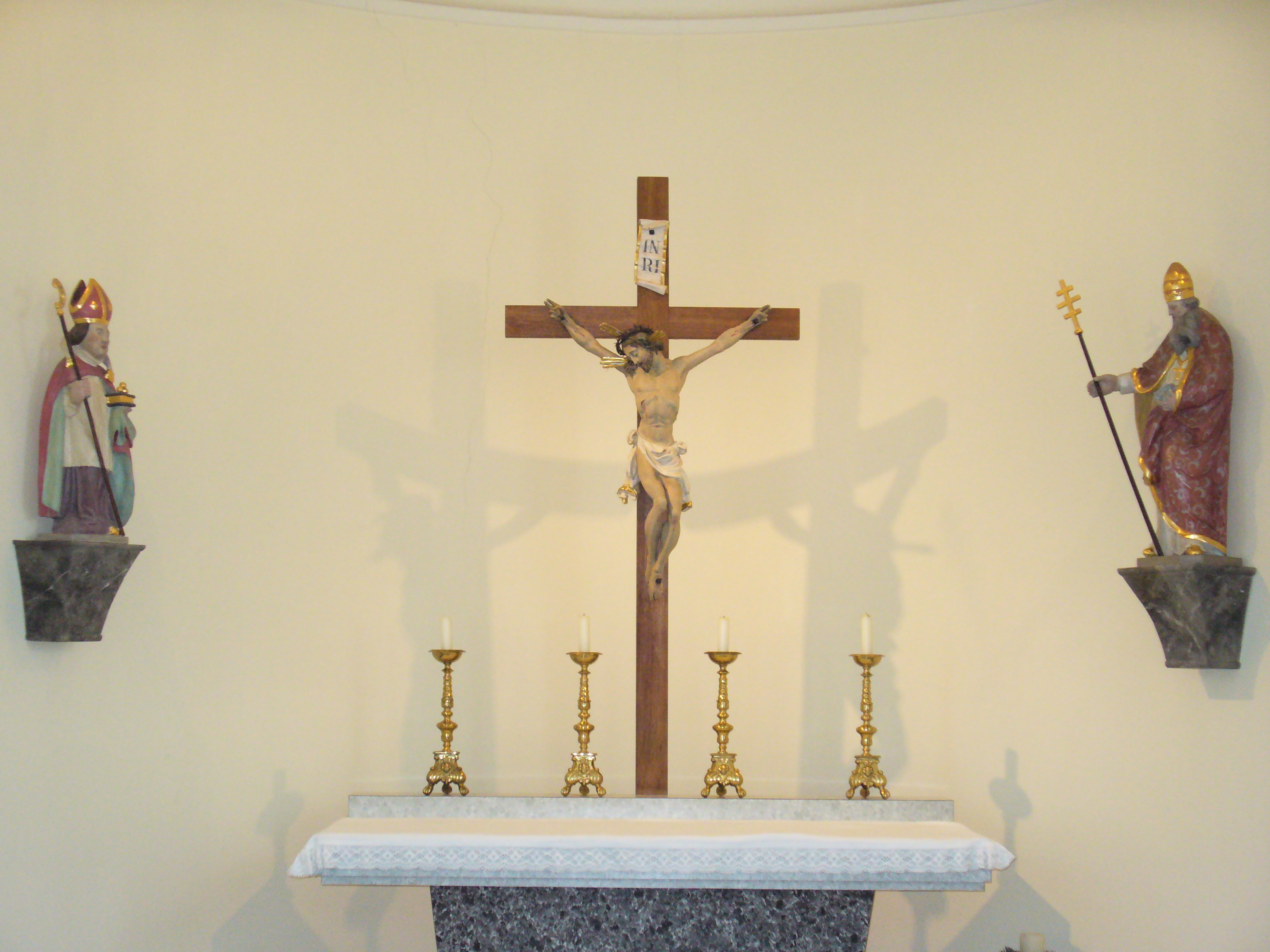 Der Altar in Hausen mit dem Heiligen Nikolaus links und dem Heiligen Ulrich rechts.